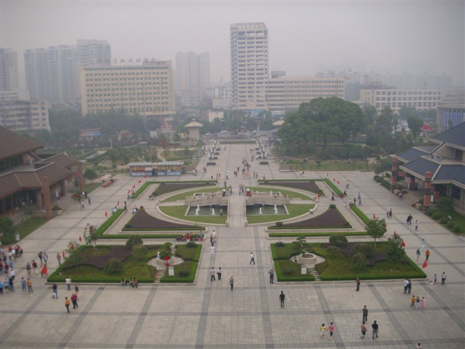 2009年10月8日摄于湖北省博物馆